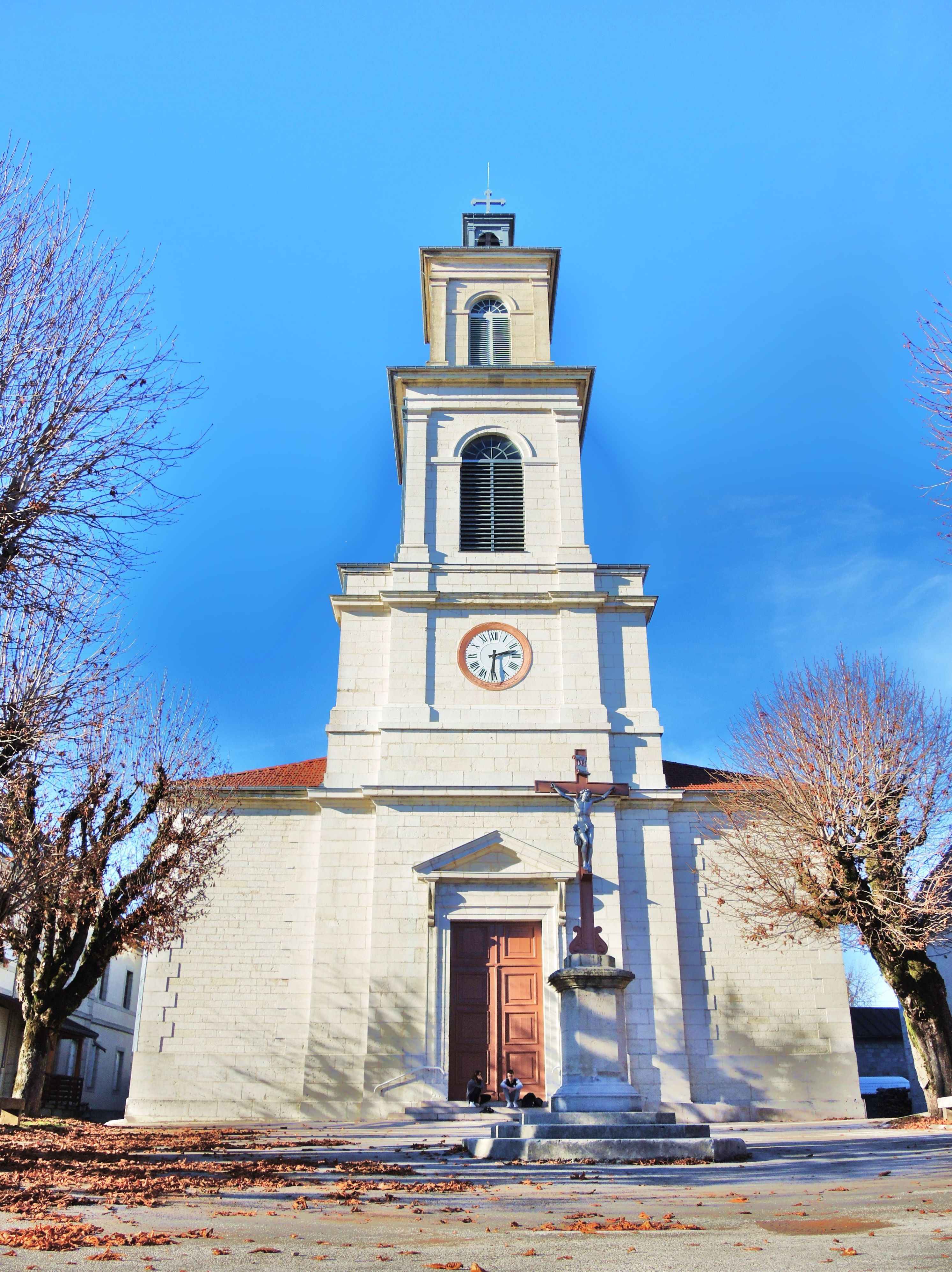 Eglise de Frasne